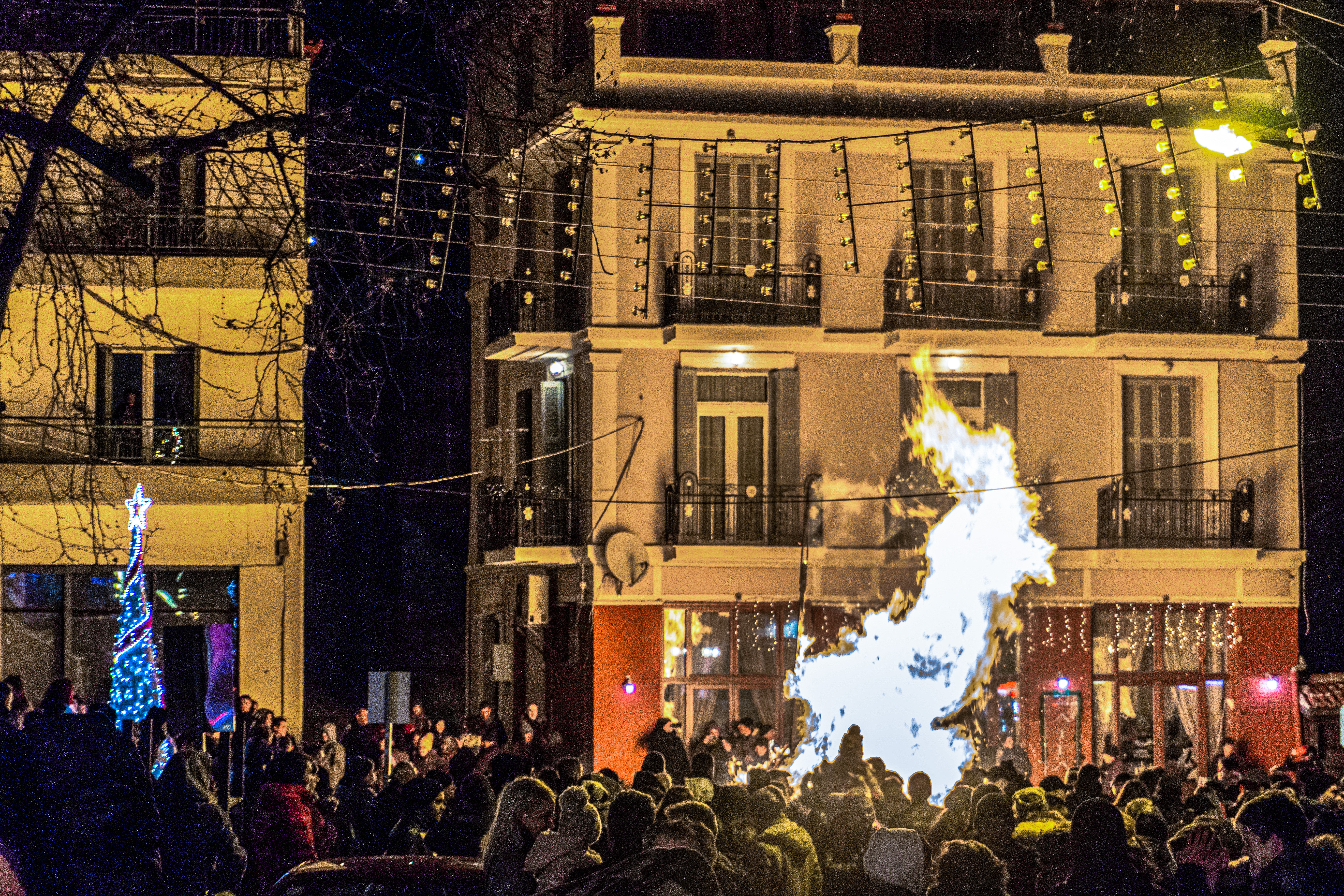 Άναμμα της κλαδαριάς στην Πλατεία Χώρας